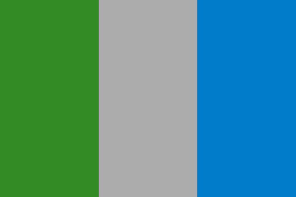 Bandera de ADIC.